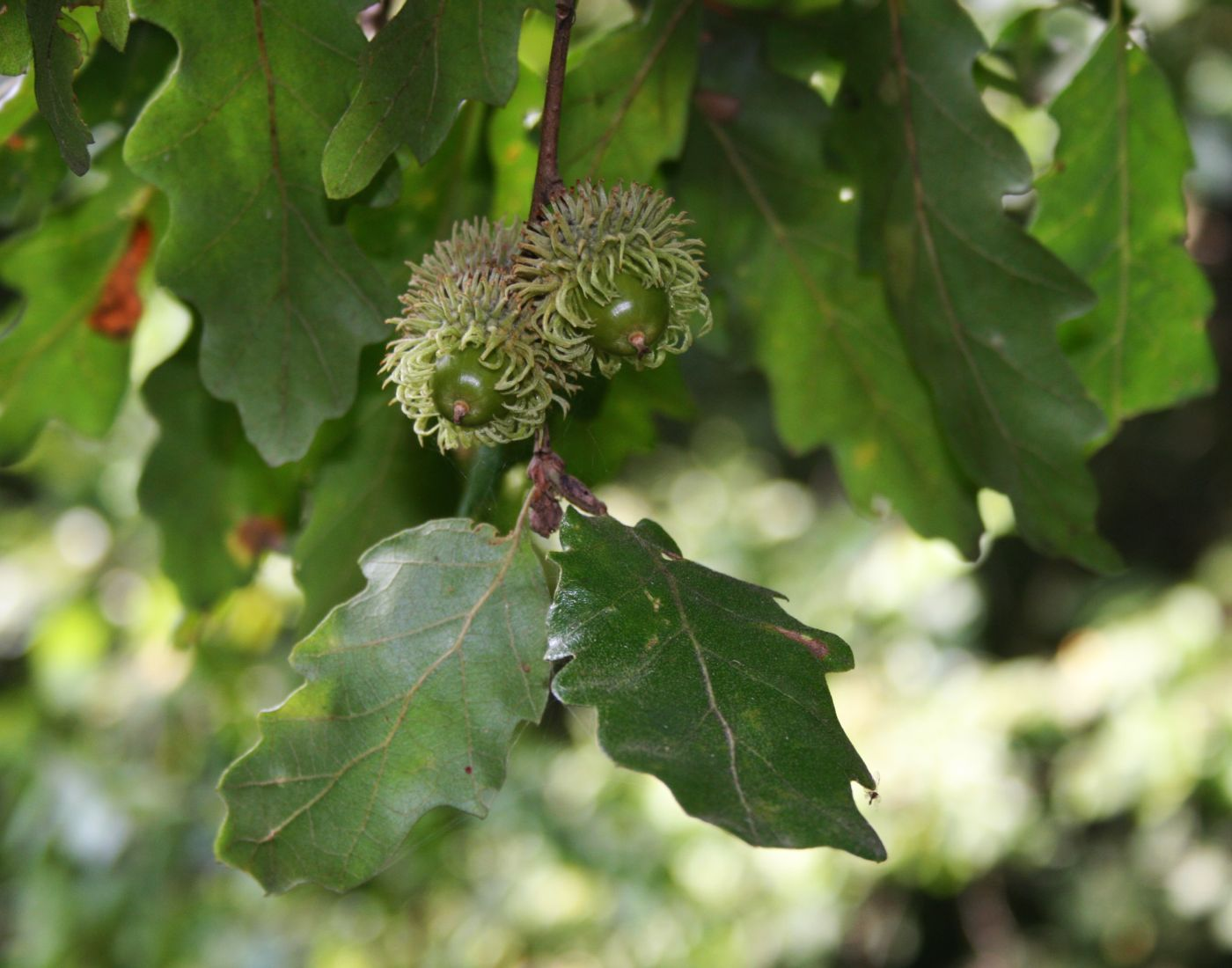 Zerr-Eiche (Quercus cerris), Buchengewächse (Fagaceae) - Österreich/Austria/Autriche: Niederösterreich, Weinviertel, „Steinbergwald“ zwischen Zistersdorf und Neusiedl an der Zaya